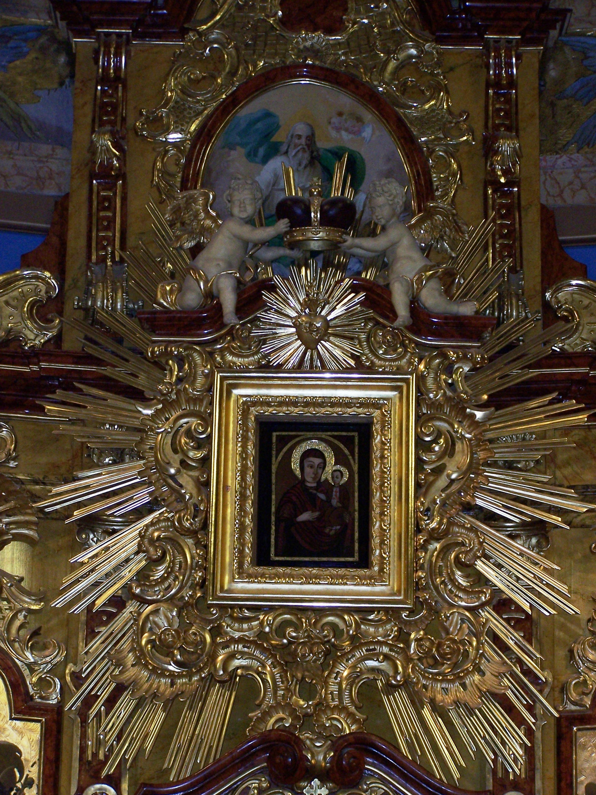 Görög katolikus templom (Máriapócs, Kossuth tér 36.) This is a photo of a monument in Hungary, Identifier: 8299